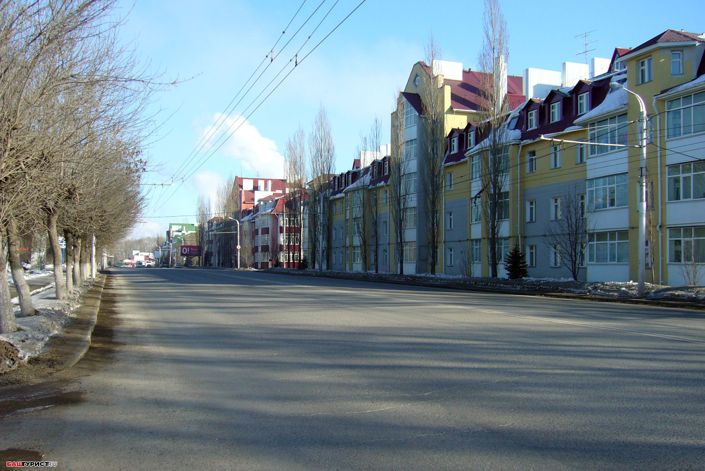 Проспект Ленина, г. Стерлитамак